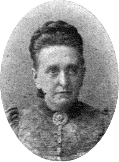 Portraitfoto der deutschen Schriftstellerin Elisabeth Bürstenbinder.